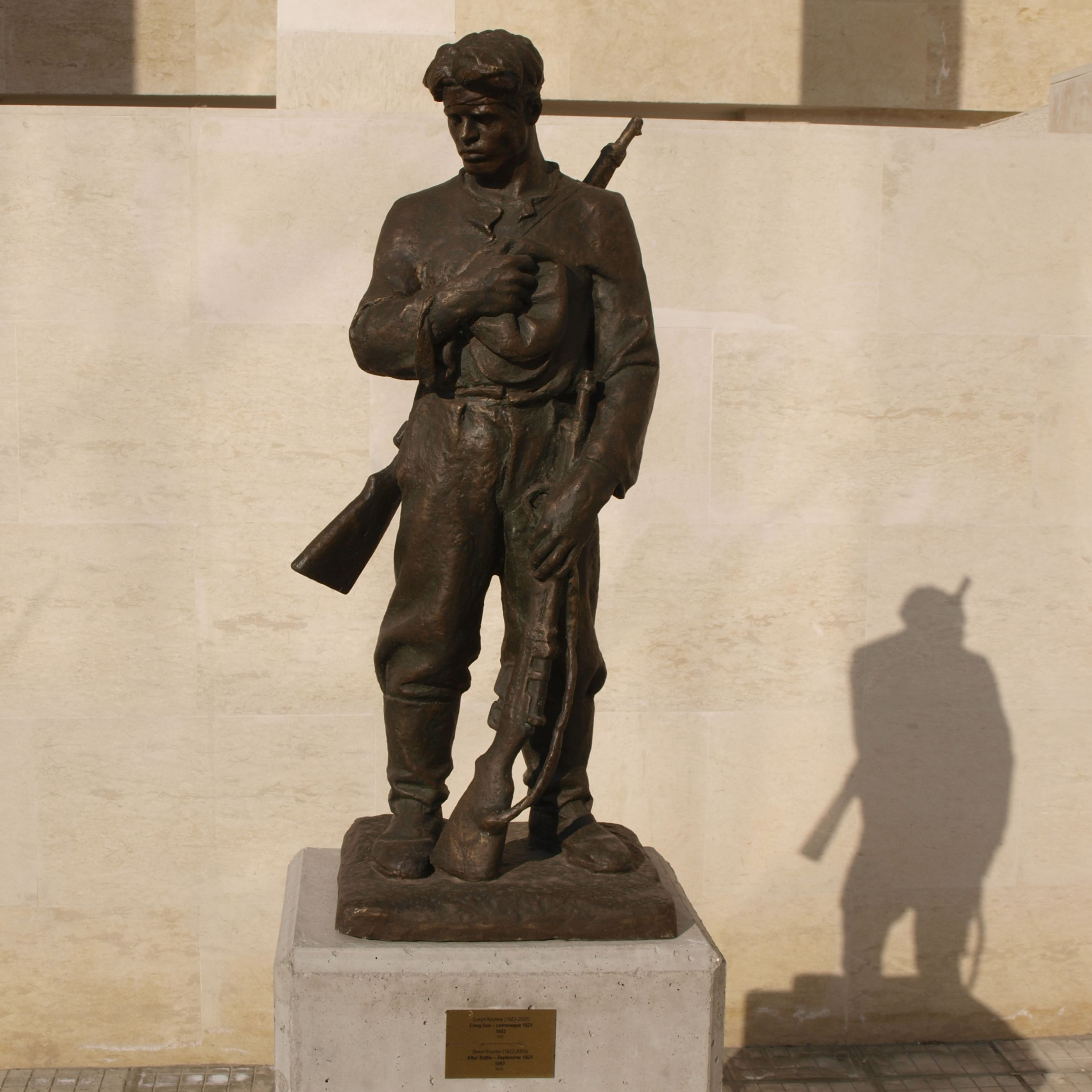 Скулптури в парка на Музея на социалистическото изкуство в София.